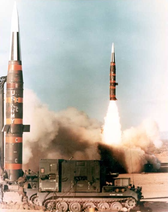 Pershing I (MGM-31A) dual launch